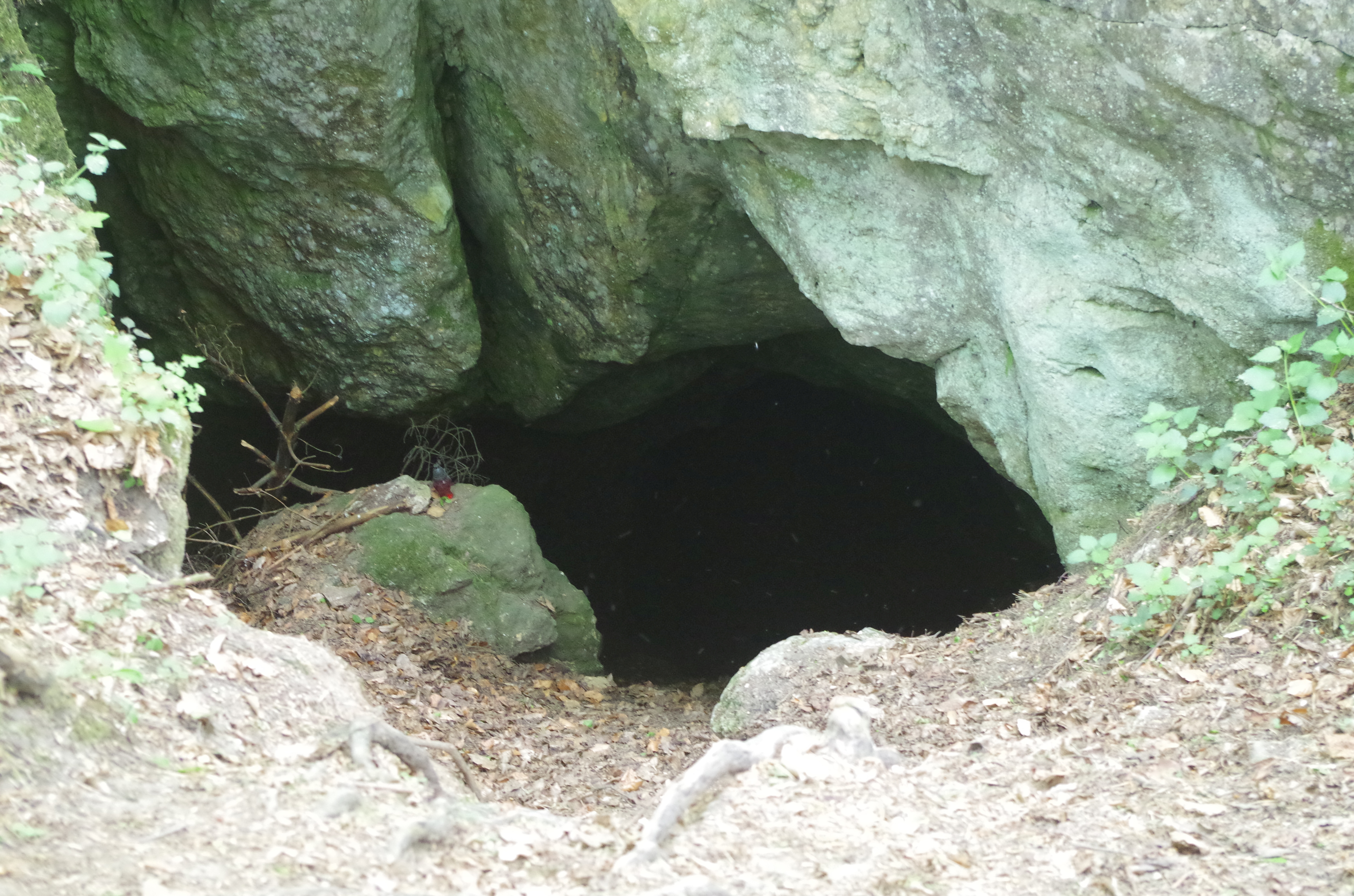 Wlot do jaskini Wielka Studnia Szpatowców w skałach Dudnik w Podlesicach